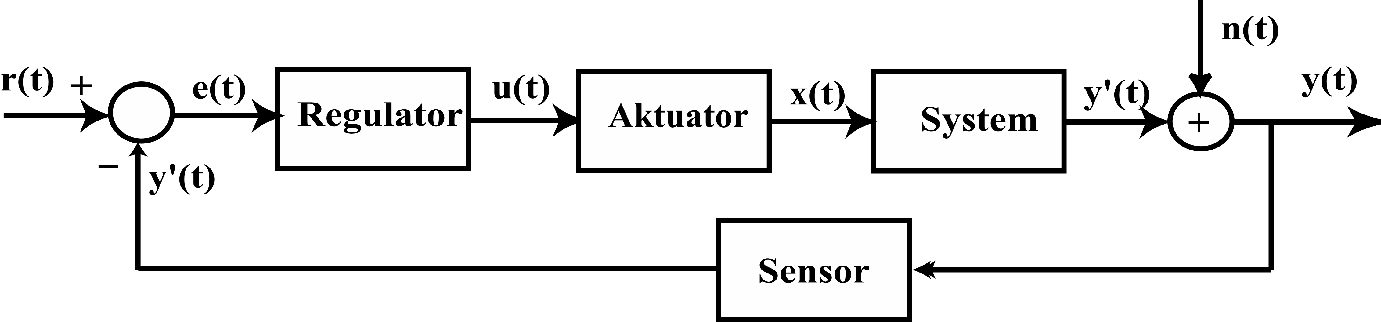 Reguleringssløyfe